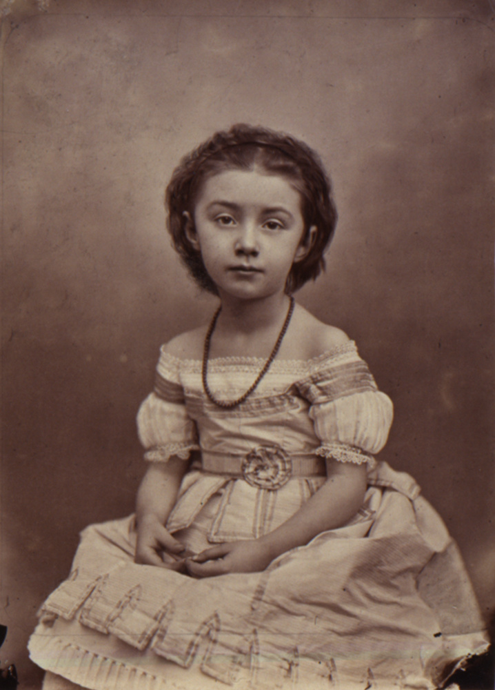 Charles-David Winter, Portrait d'une fillette, vers 1870. Photoglyptie sur papier. Musée d'art moderne et contemporain de Strasbourg. Joconde database: entry 00160009950